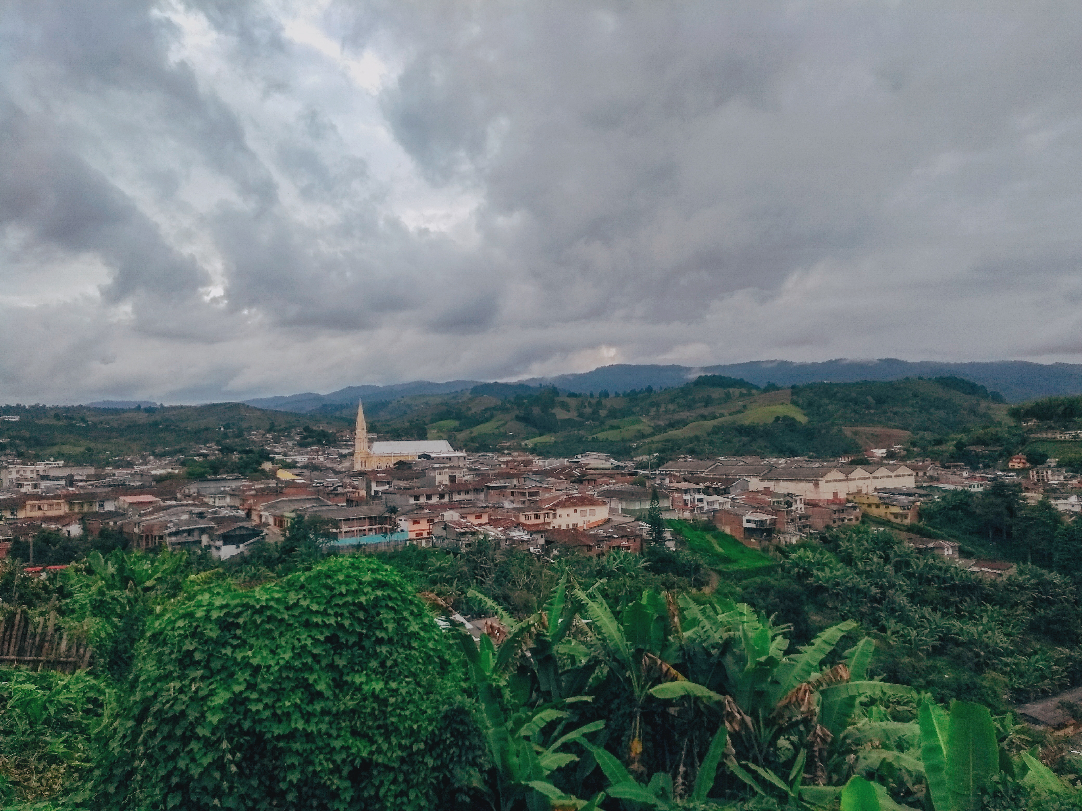 Foto de Sevilla valle mientras está nublado